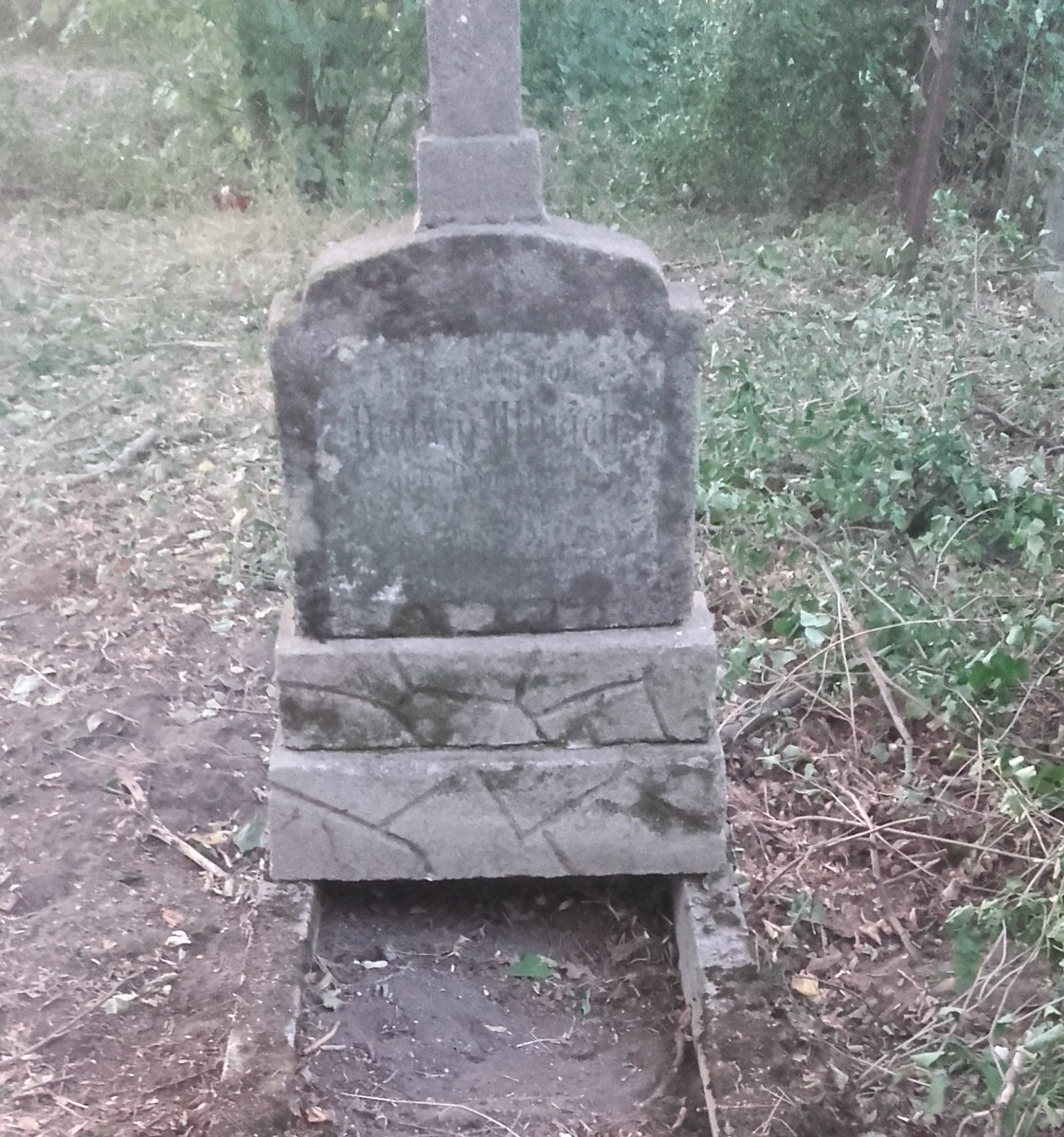 grób 1935